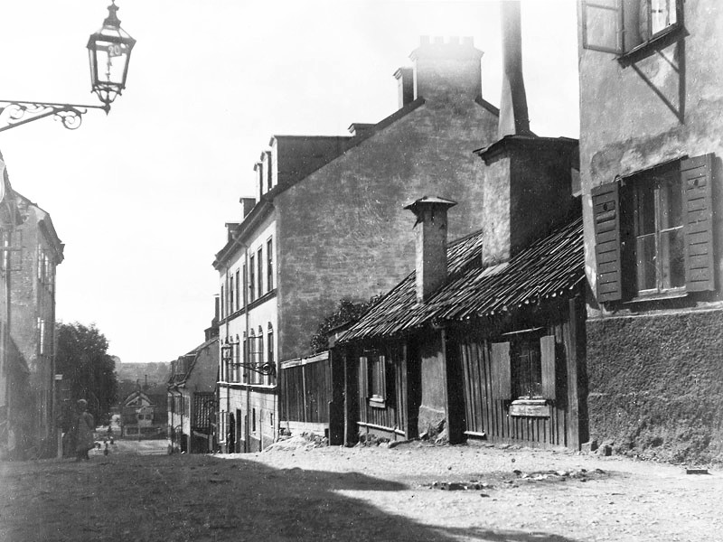 Yttersta Tvärgränd 6 (stenhuset)